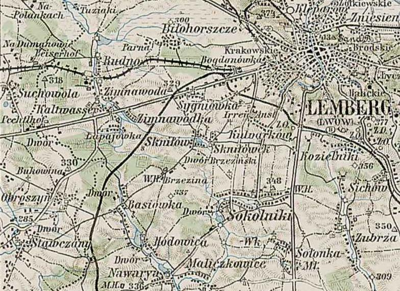 Карта місцевості, в якій тепер розміщене с. Конопниця, дійсна на 1894 рік